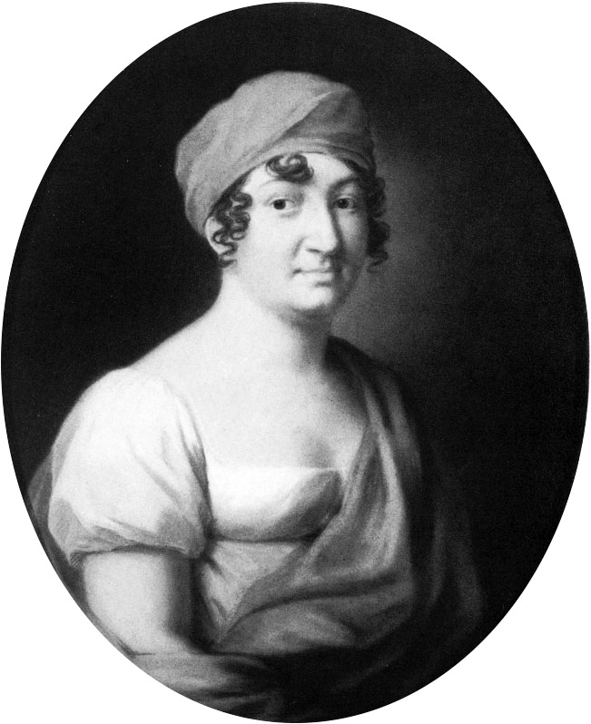 Reichgrafin von Hochberg, née Luise Karoline Geyer von Geyersberg (1768-1820)